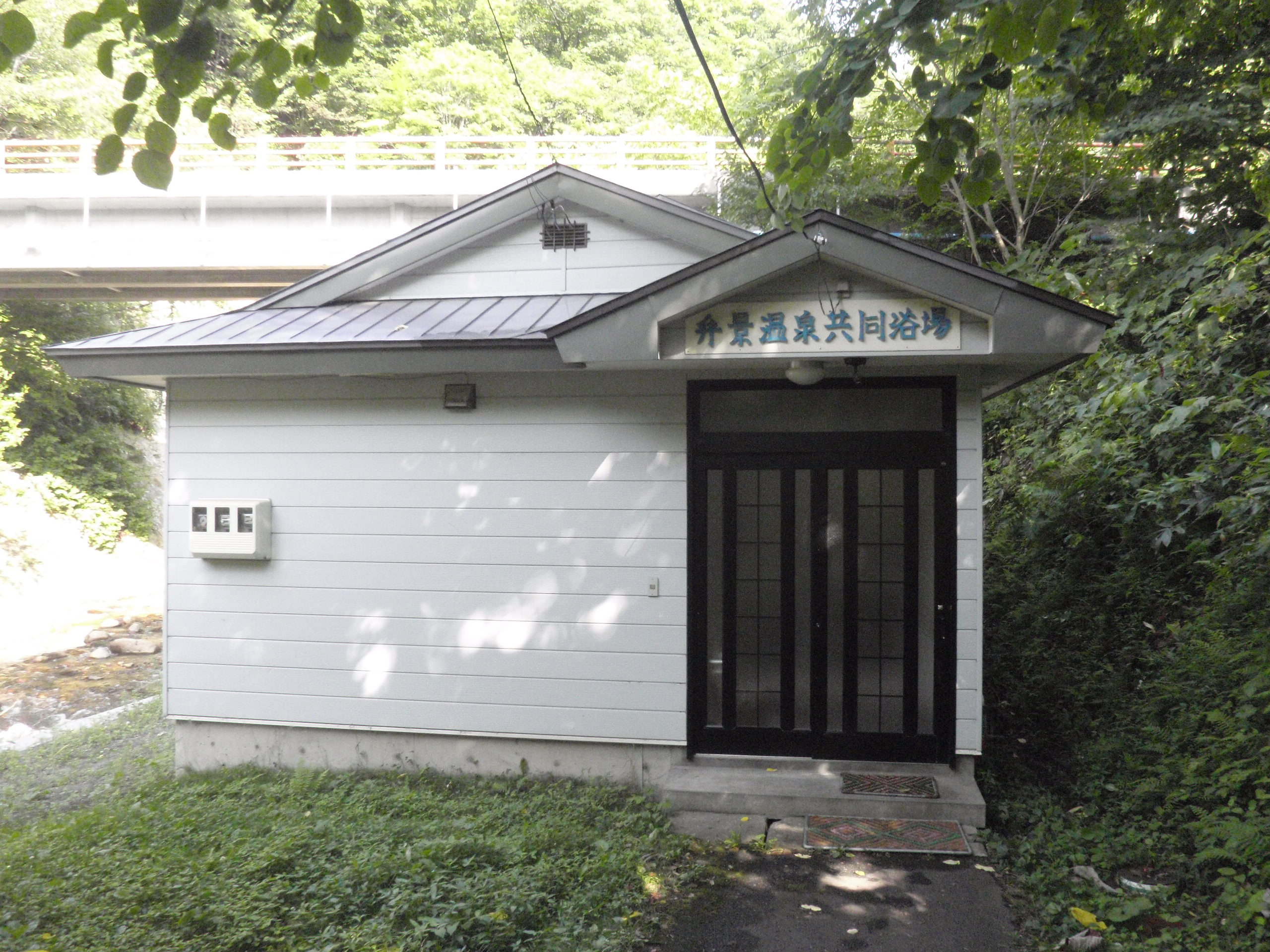 弁景温泉共同浴場